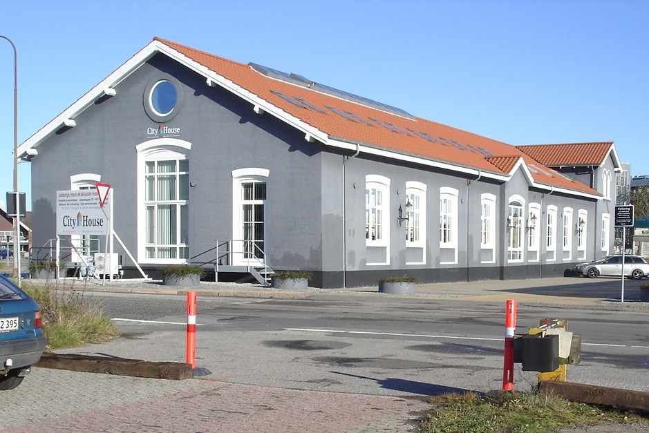 Aalborg Privatbaners hovedkontor set fra S